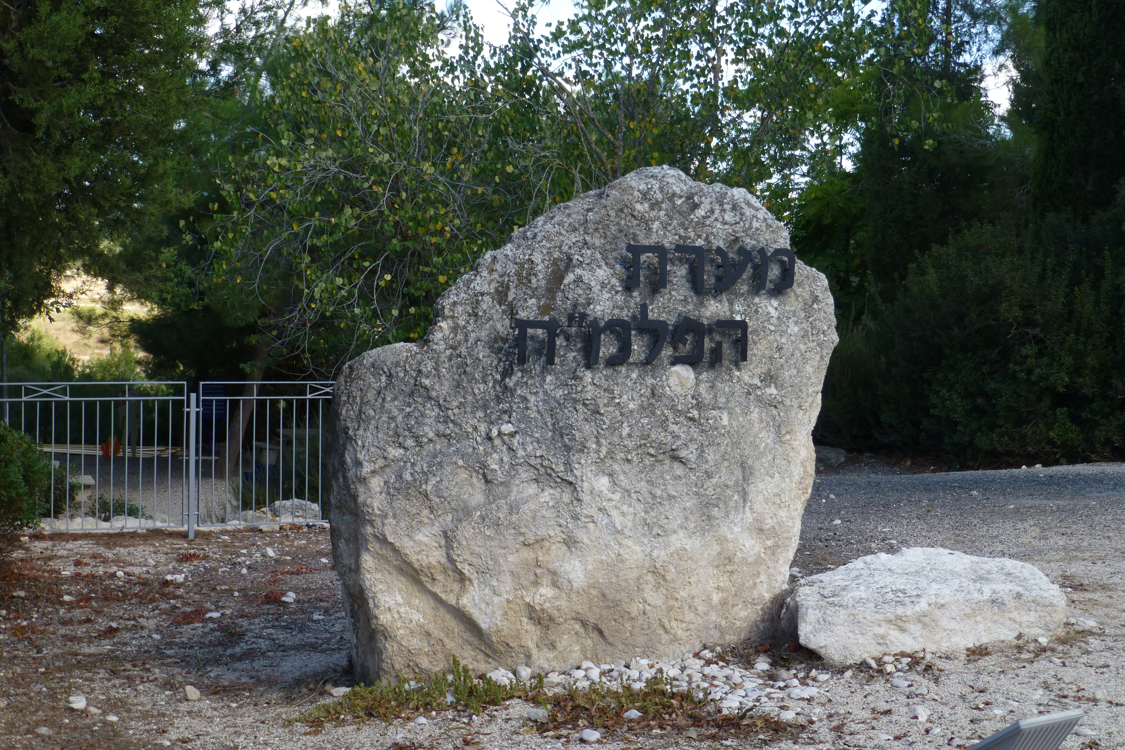 מערת הפלמ"ח במשמר העמק